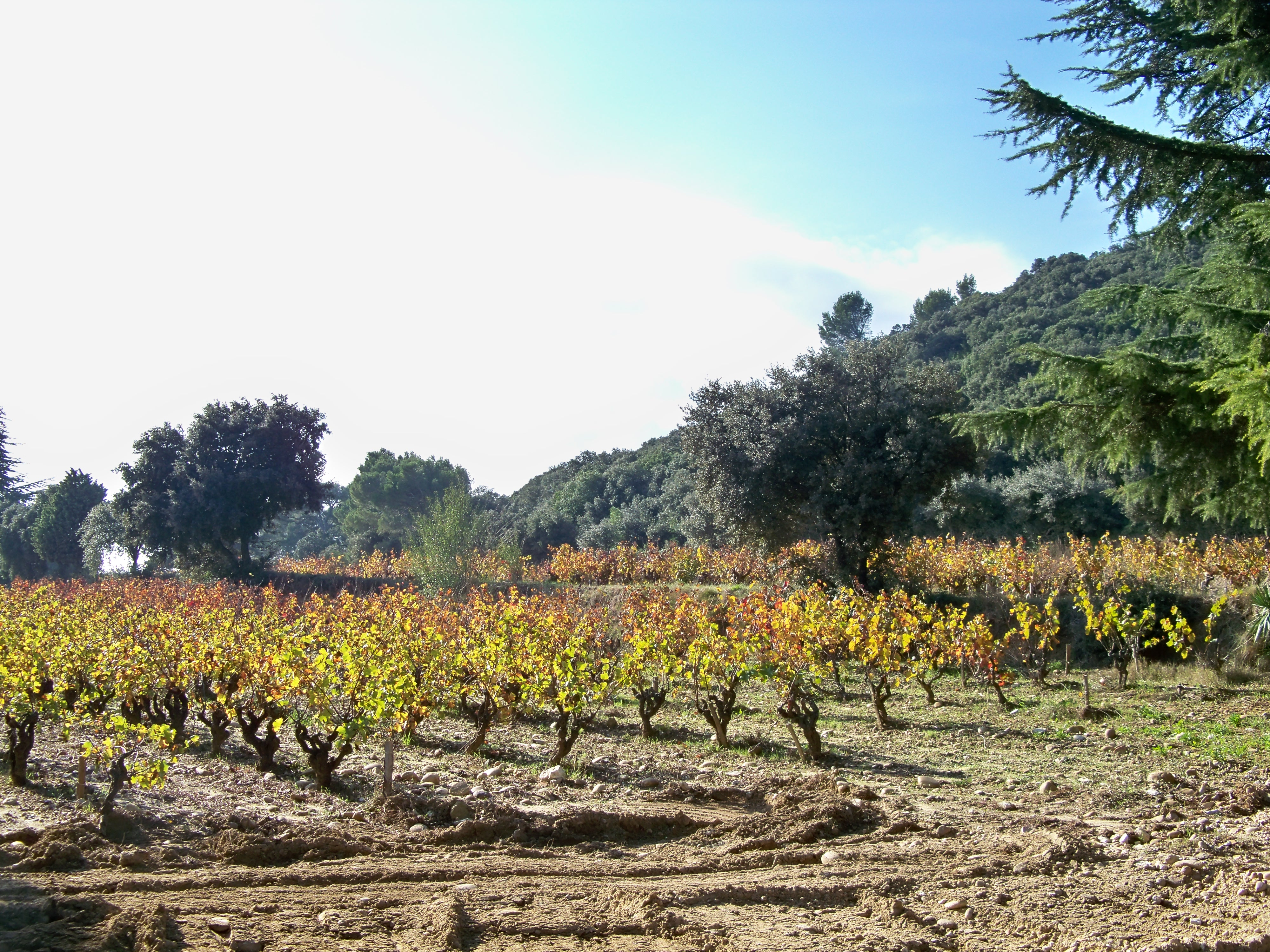 Vigne du Prieuré de Montézargues